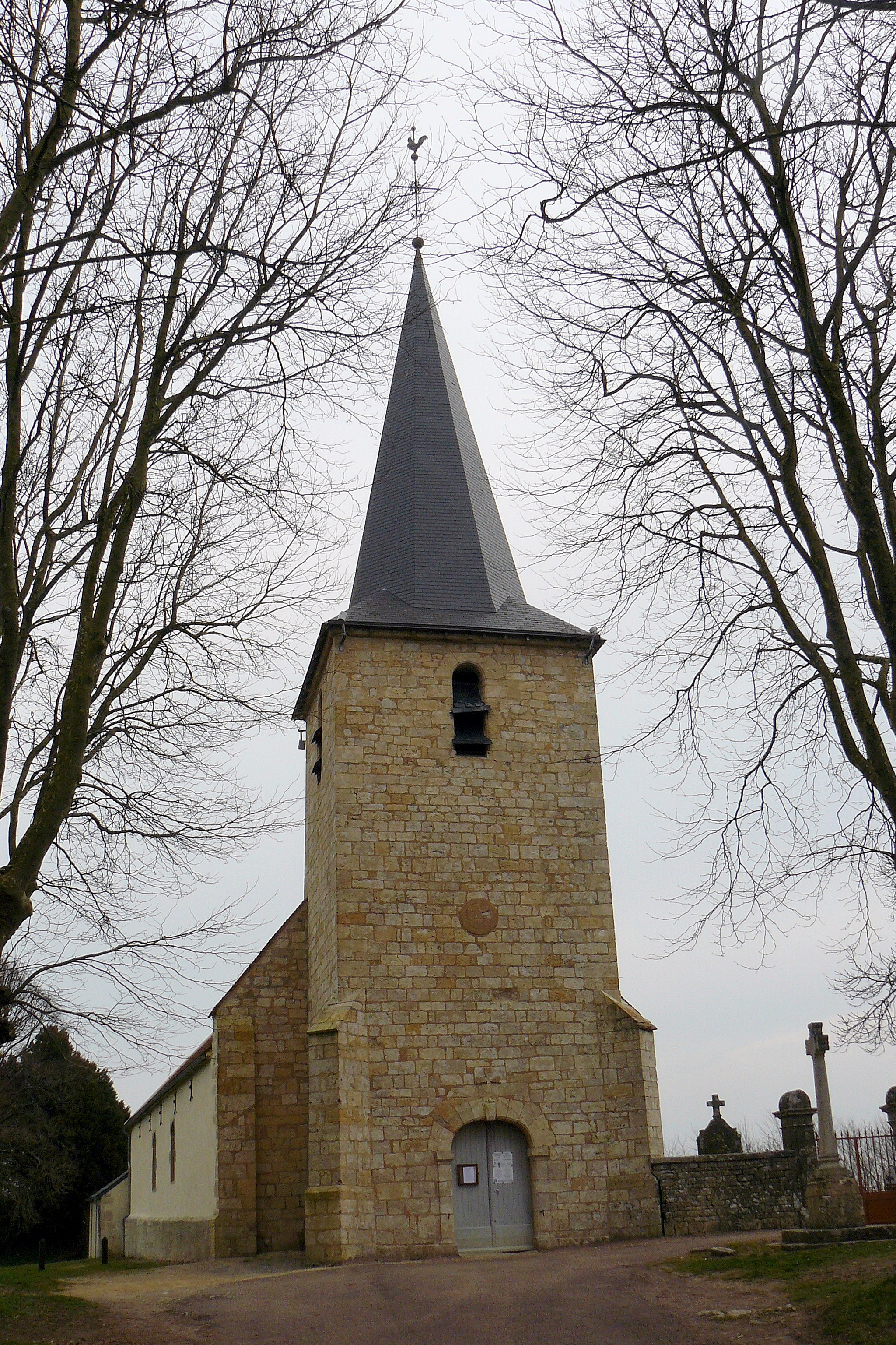 Butte de Montenoison (Nièvre, France) : l'église